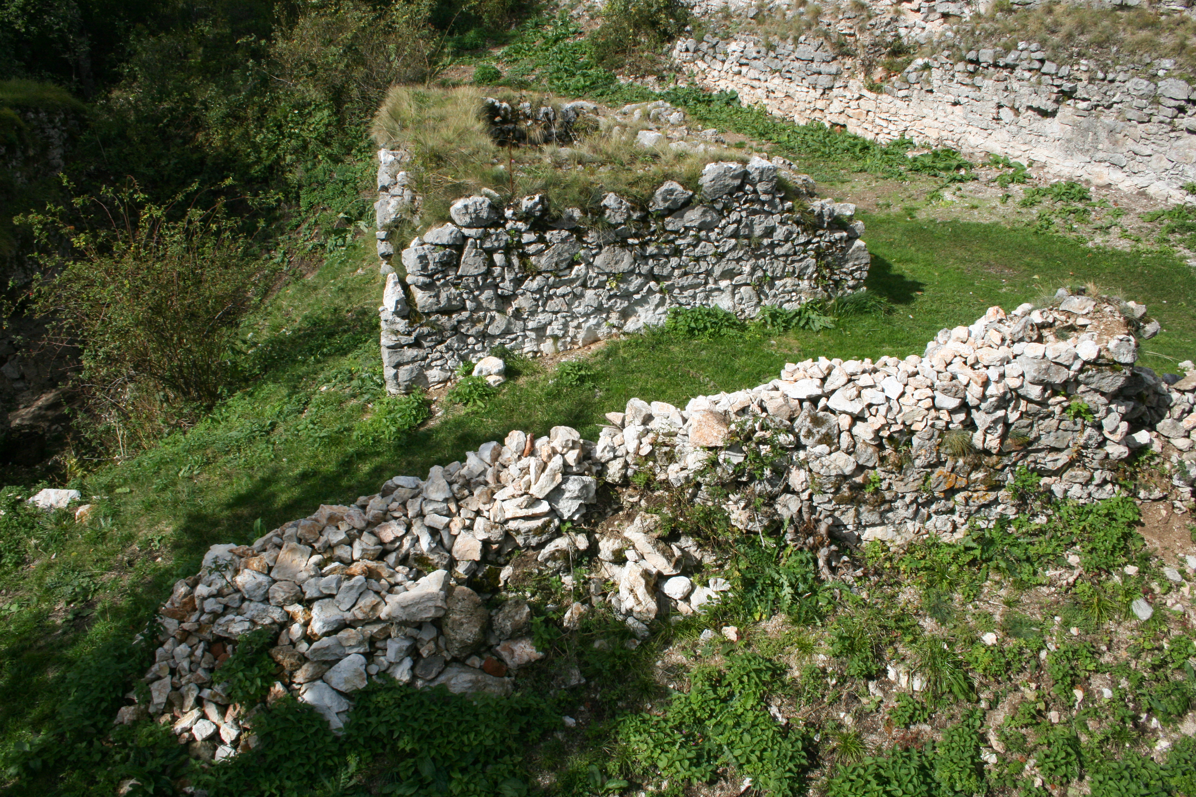 Pozostatky Muránskeho hradu.